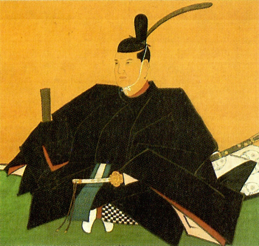 細川綱利の肖像。